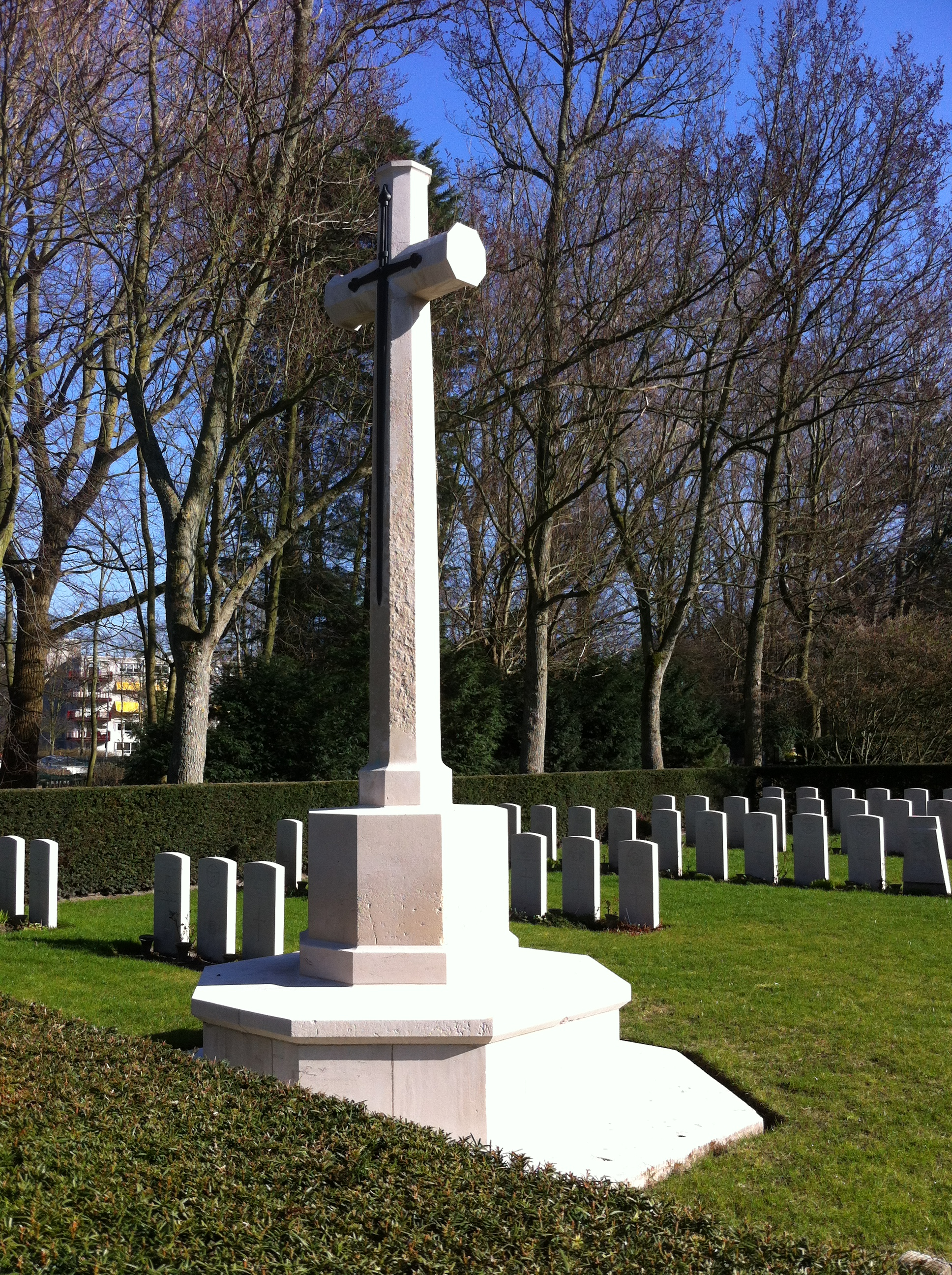 Het Britse ereveld in Den Haag herbergt de graven van een aantal gesneuvelde militairen. Ontwerper offerkruis: Sir Reginald Blomfield. Locatie: begraafplaats 'Westduin', Ockenburghstraat 27, Den Haag.